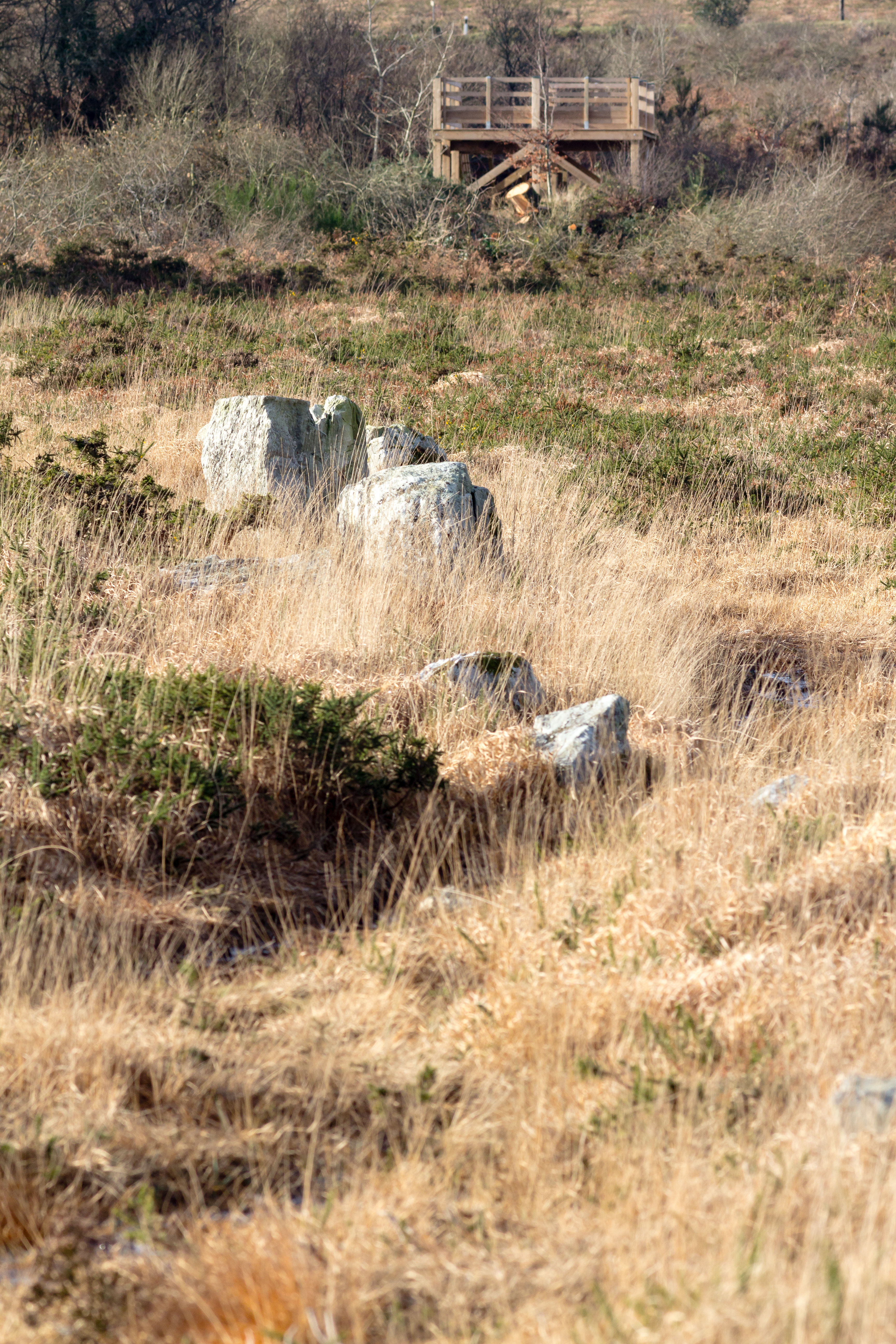 Alignement mégalithique de la Noce de Pierres (an Eured Veign) dans le Yeun Elez (Brasparts, France).